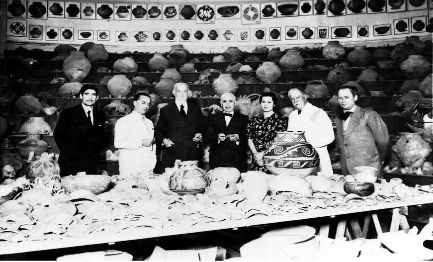 Los hermanos Emilio y Duncan Wagner junto a Olimpia Righetti y otros, en el Museo Arcaico.